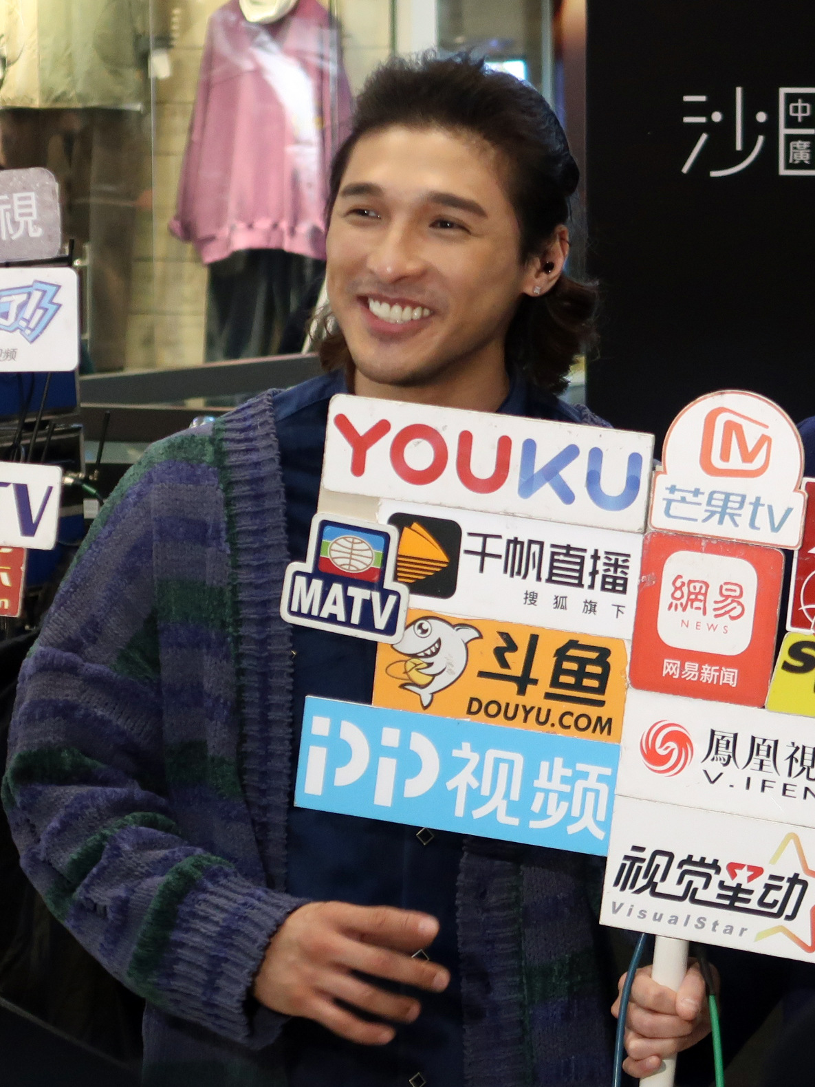 Wong You Nam